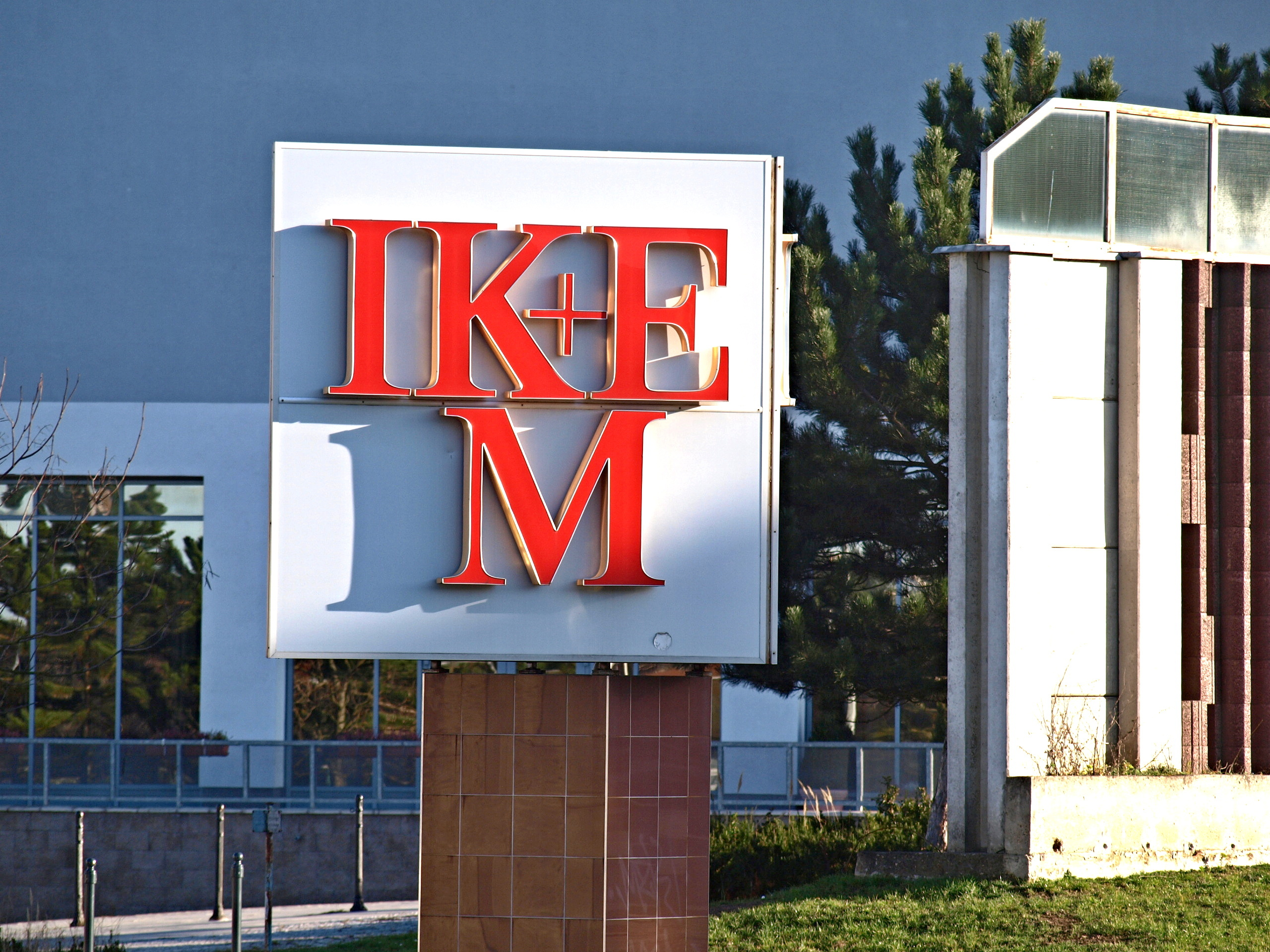 IKEM, Praha 4-Krč